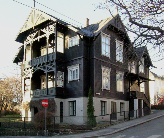 Bolteløkka Allé 4, Oslo. Built 1894. Architect Anders Holsen.